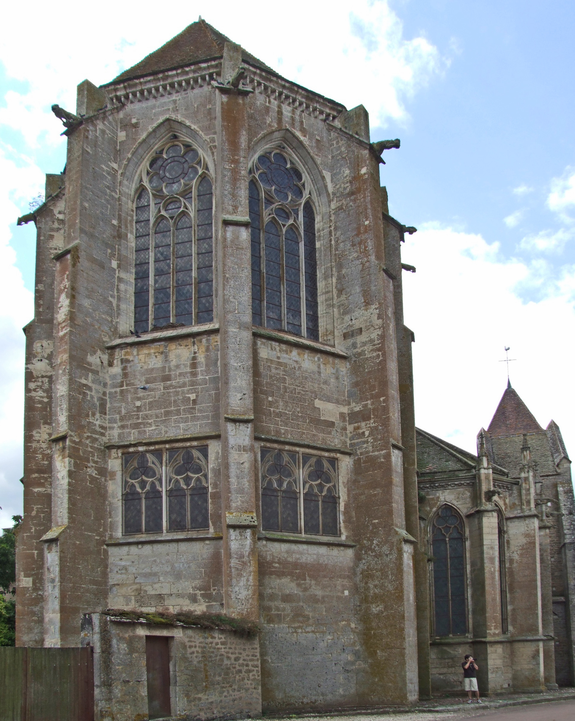 St-Thibault de Saint-T%hibault, Chor, von Nordost